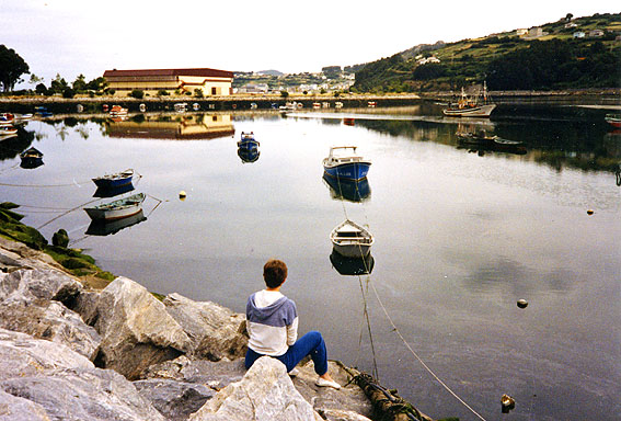 Muelle de la Misericordia en Vivero. Fotografía realizada por Lourdes Cardenal en agosto de 1985.